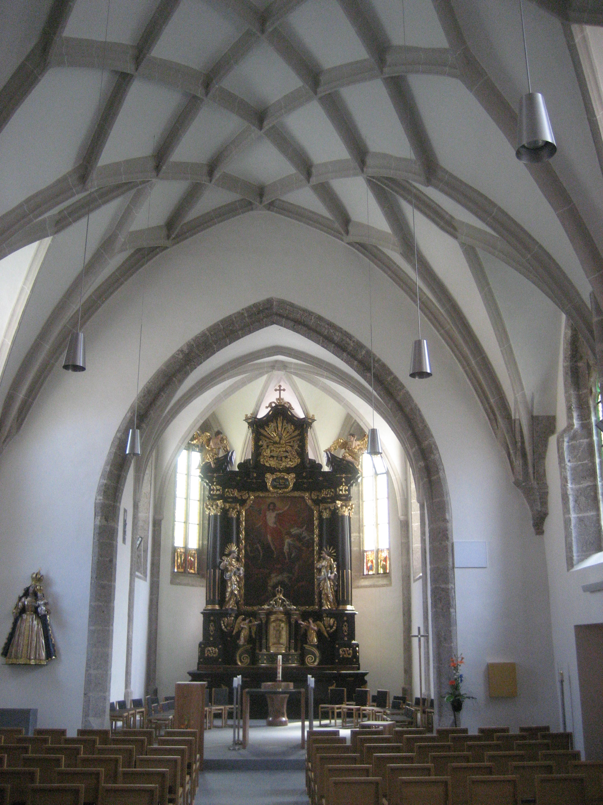 Kath. Pfarrkirche hll. Peter und Paul